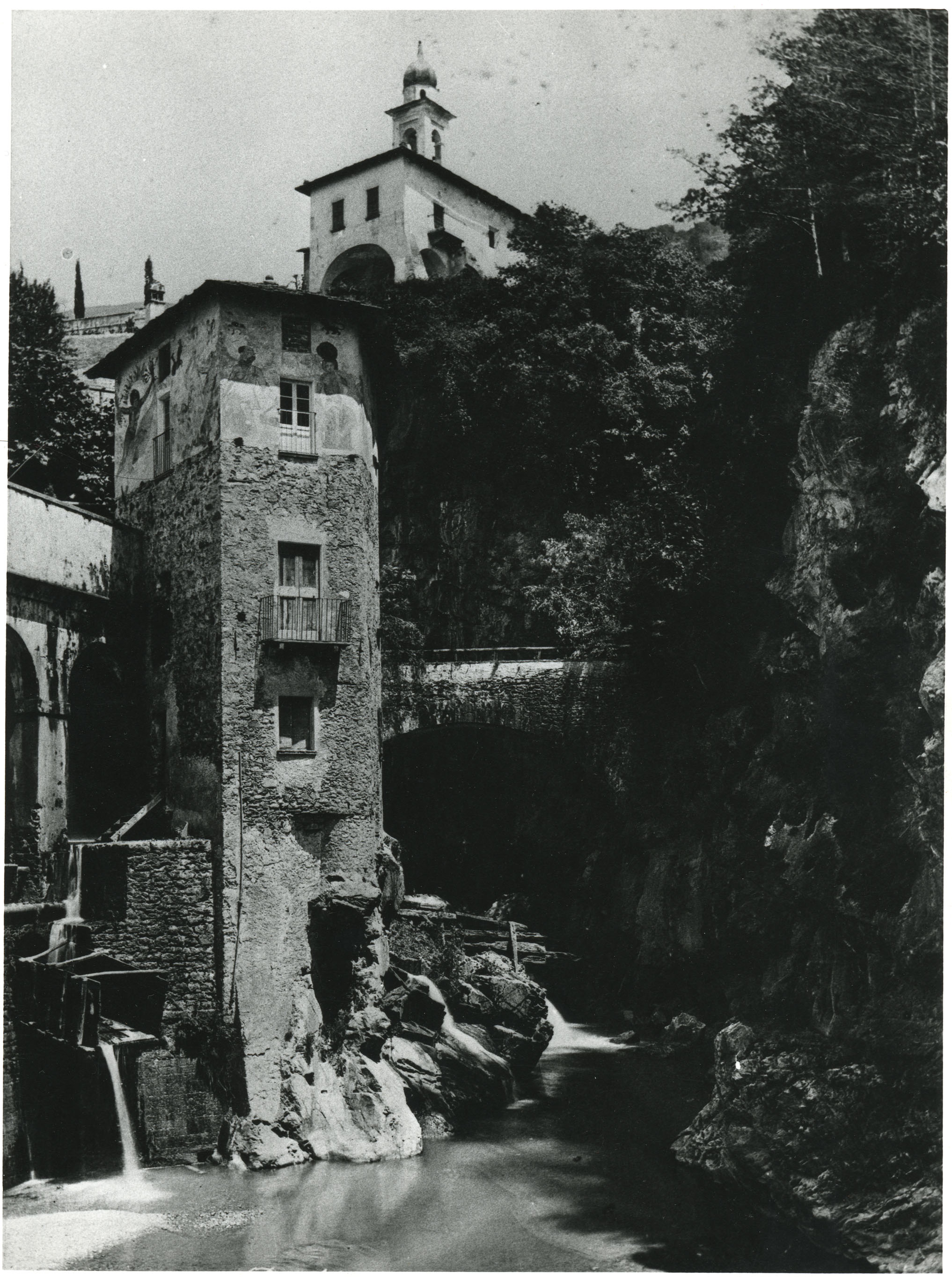 Orrido di Bellano - Casa del diavolo. Archivio Pietro Pensa, fondo fotografico, selezione di Elvia Redaelli, 2008, n. 20.